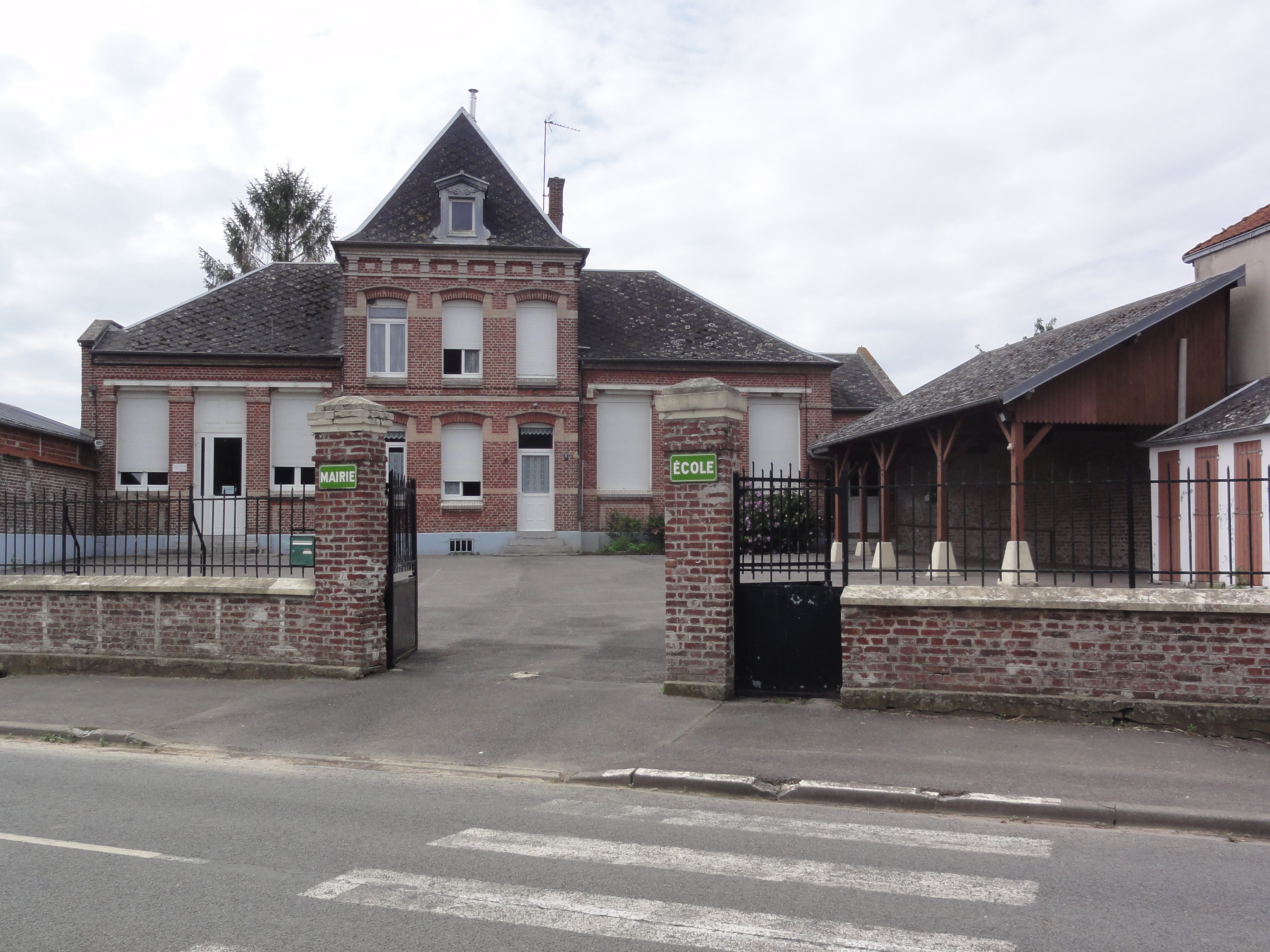 Ollezy (Aisne) mairie-école